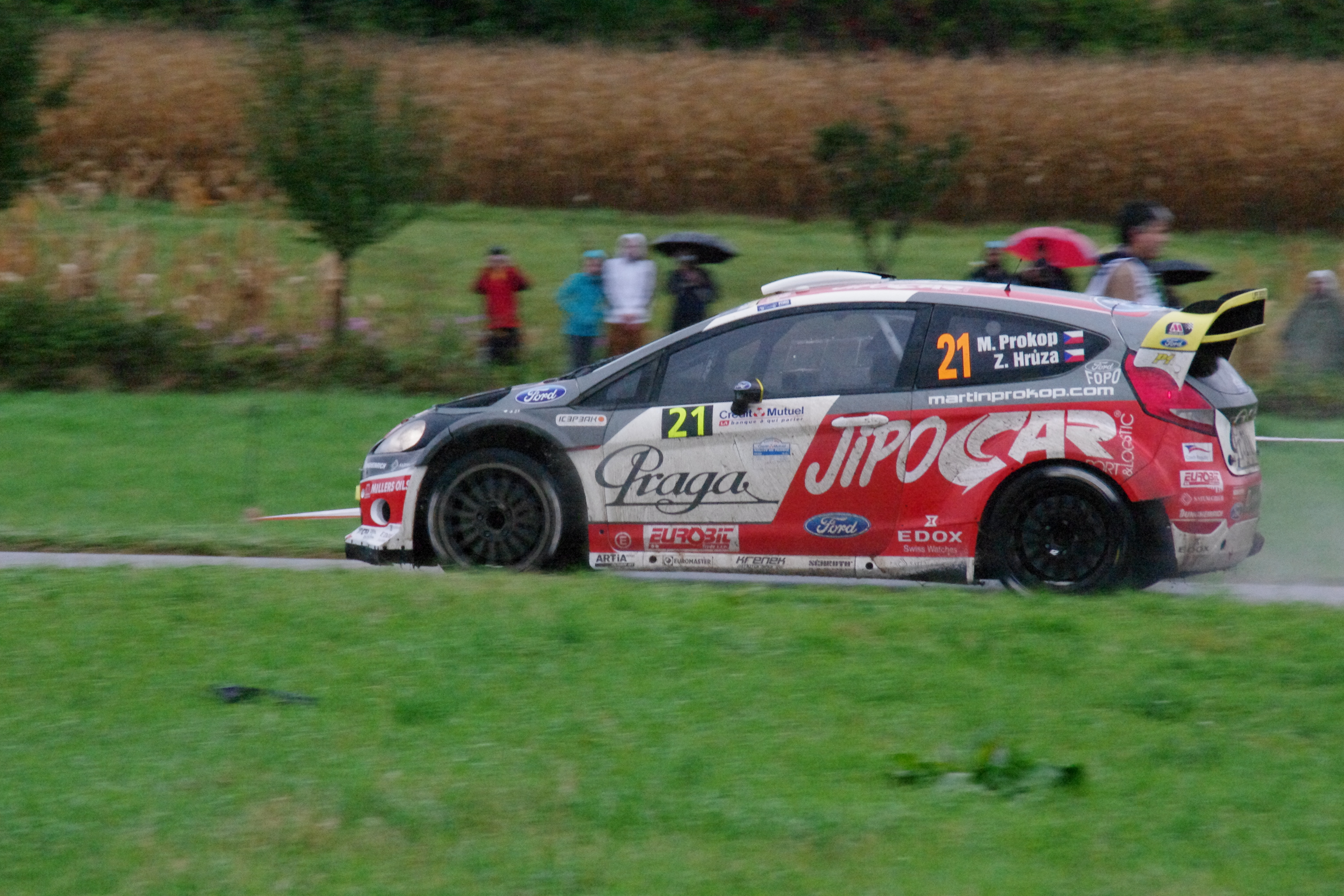 Martin Prokop - Rallye de France 2012